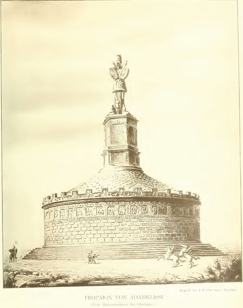 Das Tropaion von Adamklissi und provinzialromische Kunst (1903) Adamclisi Monument 05